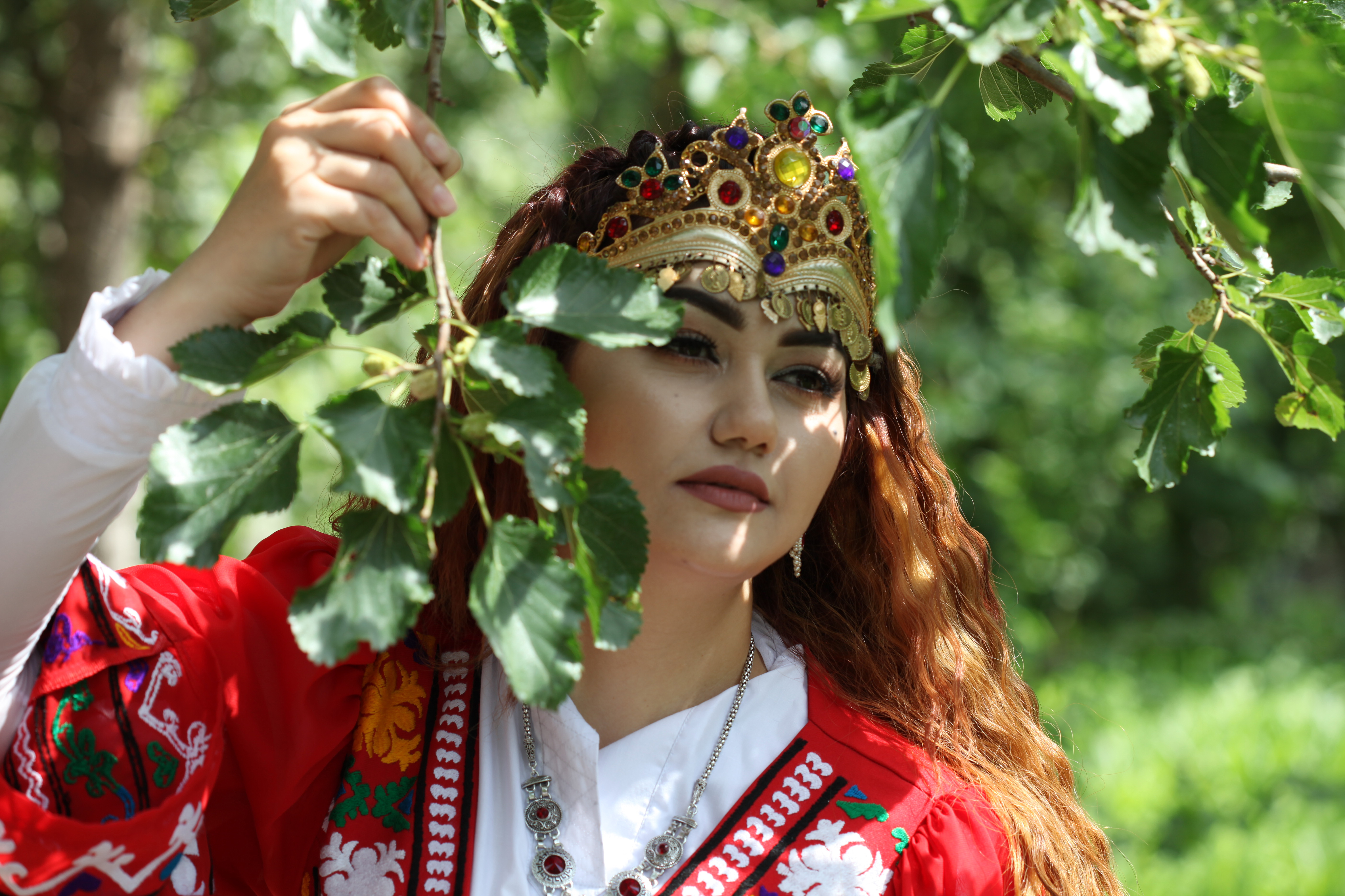 Тоҷикӣ: Таҳмина Раҷабова — ҳунарпешаи синамо, рӯзноманигор, ровии барномаҳои телевизионӣ.